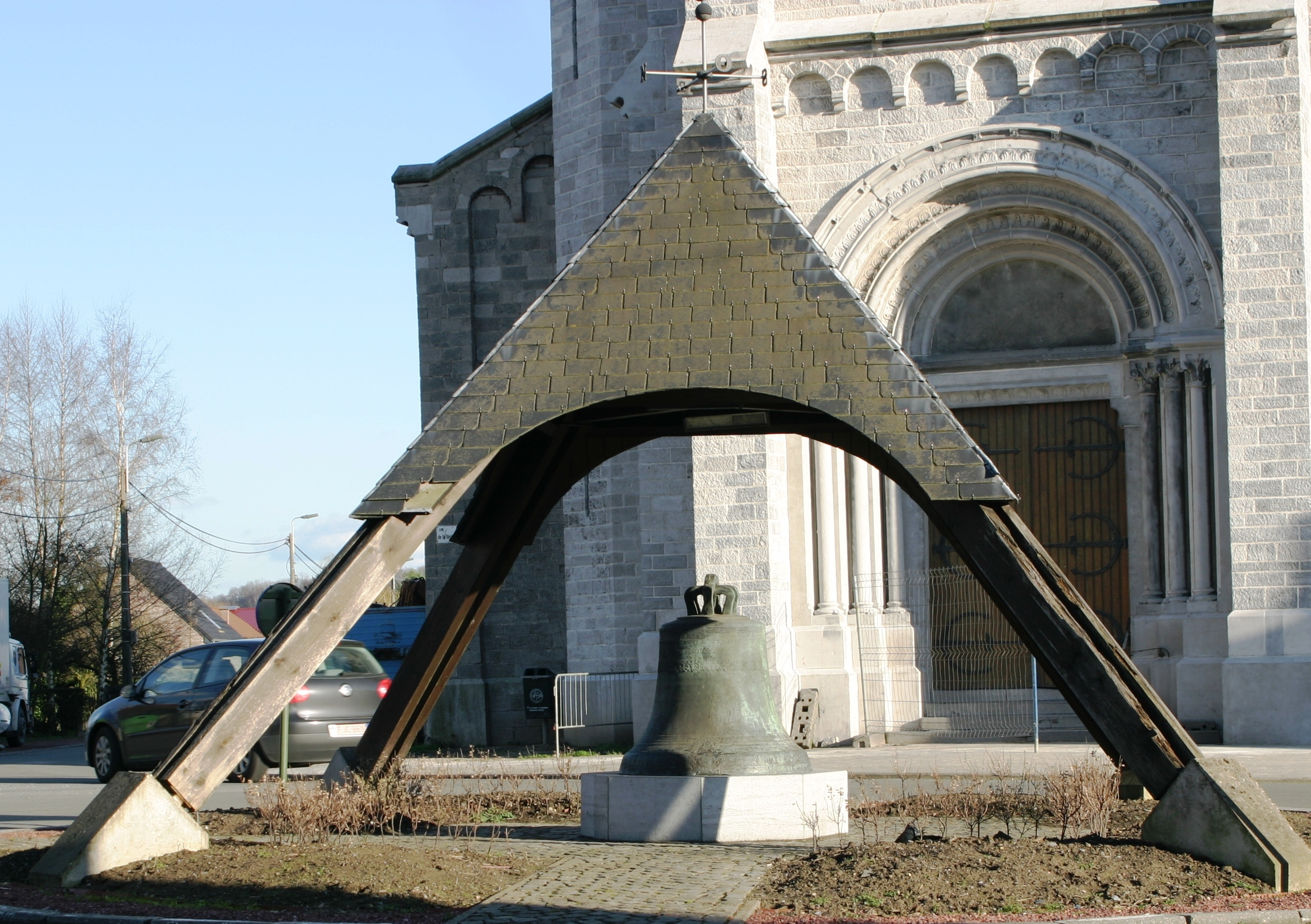 Klack virun der Kierch zu Glons.